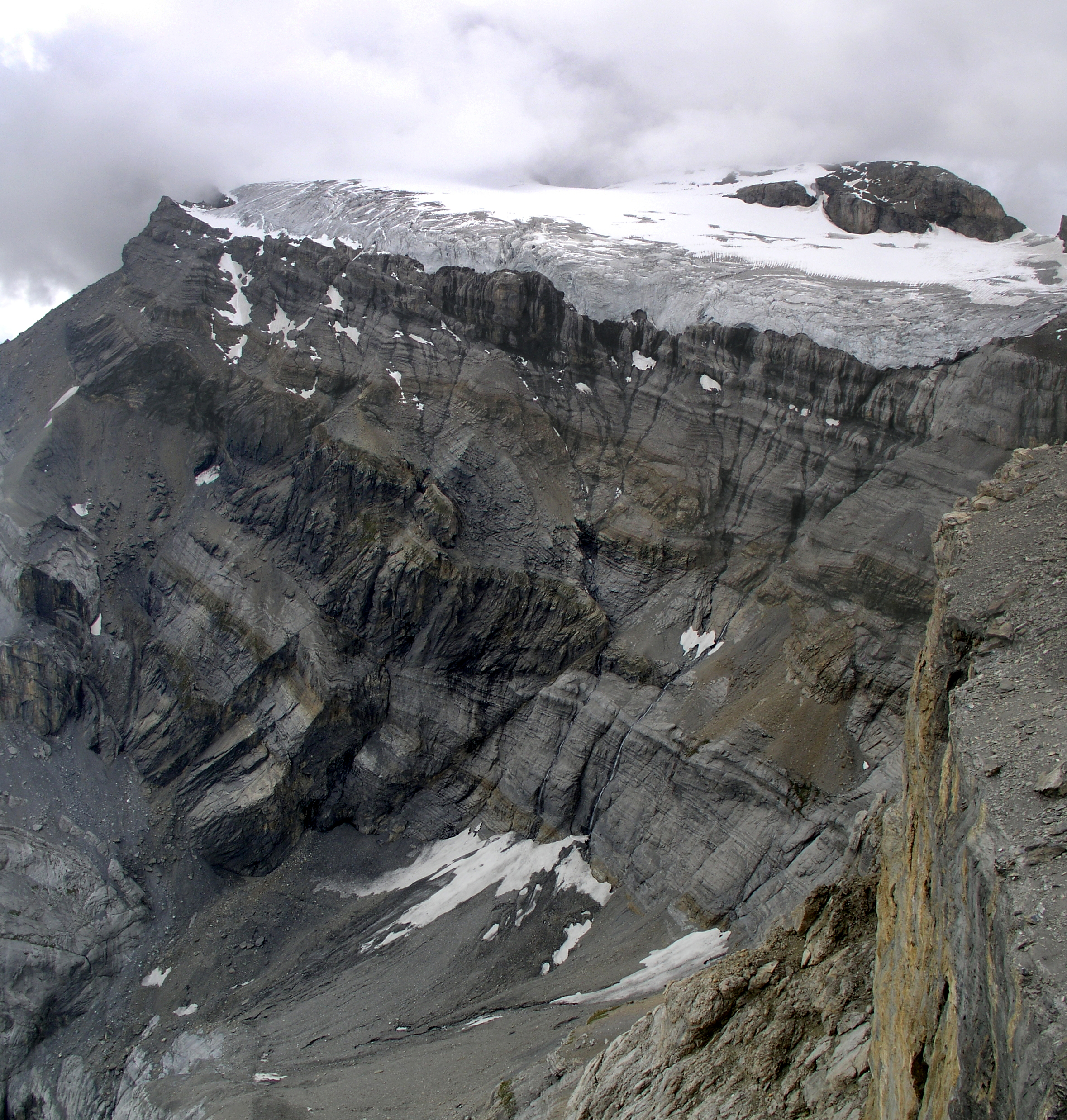 Glacier de Tsanfleuron, Savièse, Valais, Suisse.